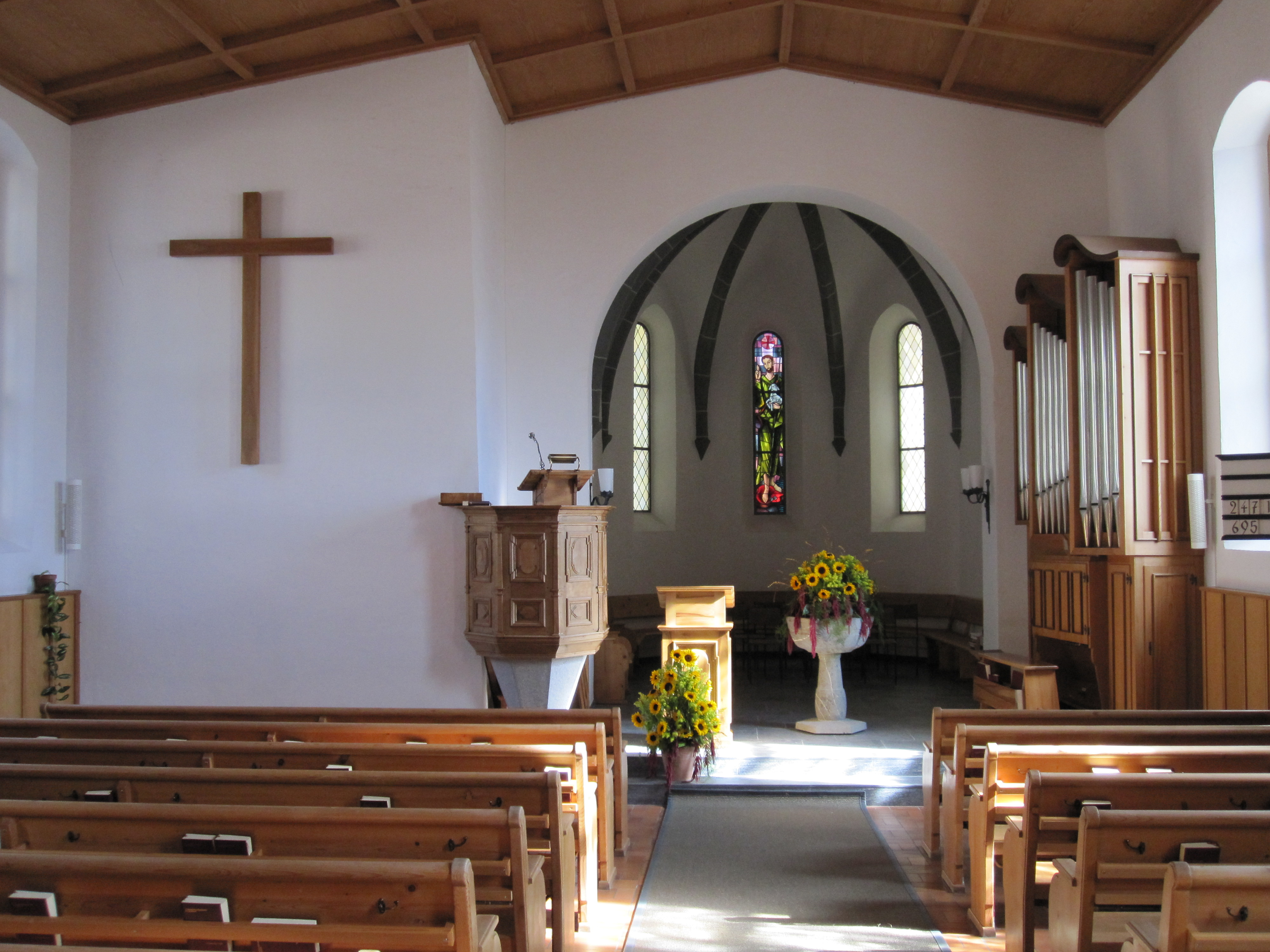 reformierte Kirche Jenins (Kanton Graubünden)